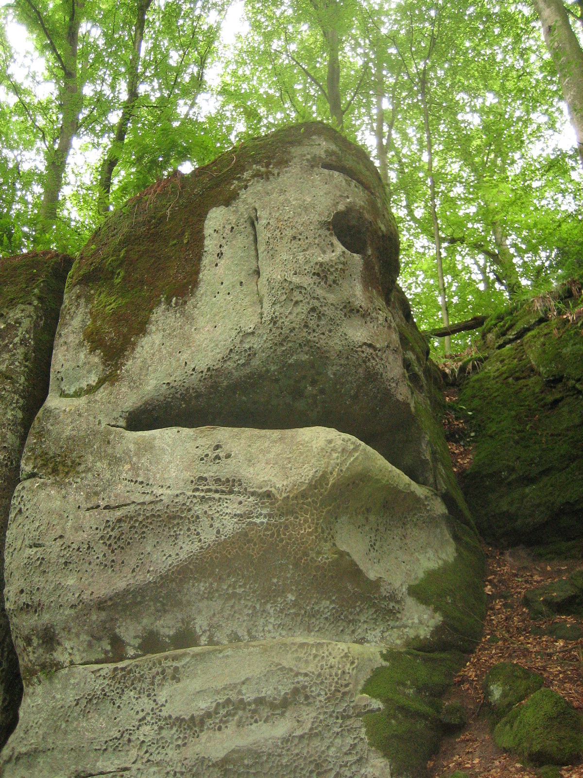 Sujet: Fielsformatioun an der Äsbech, Kleng Lëtzebuerger Schwäiz Auteur: Zinneke Lizenz: GNU-FDL